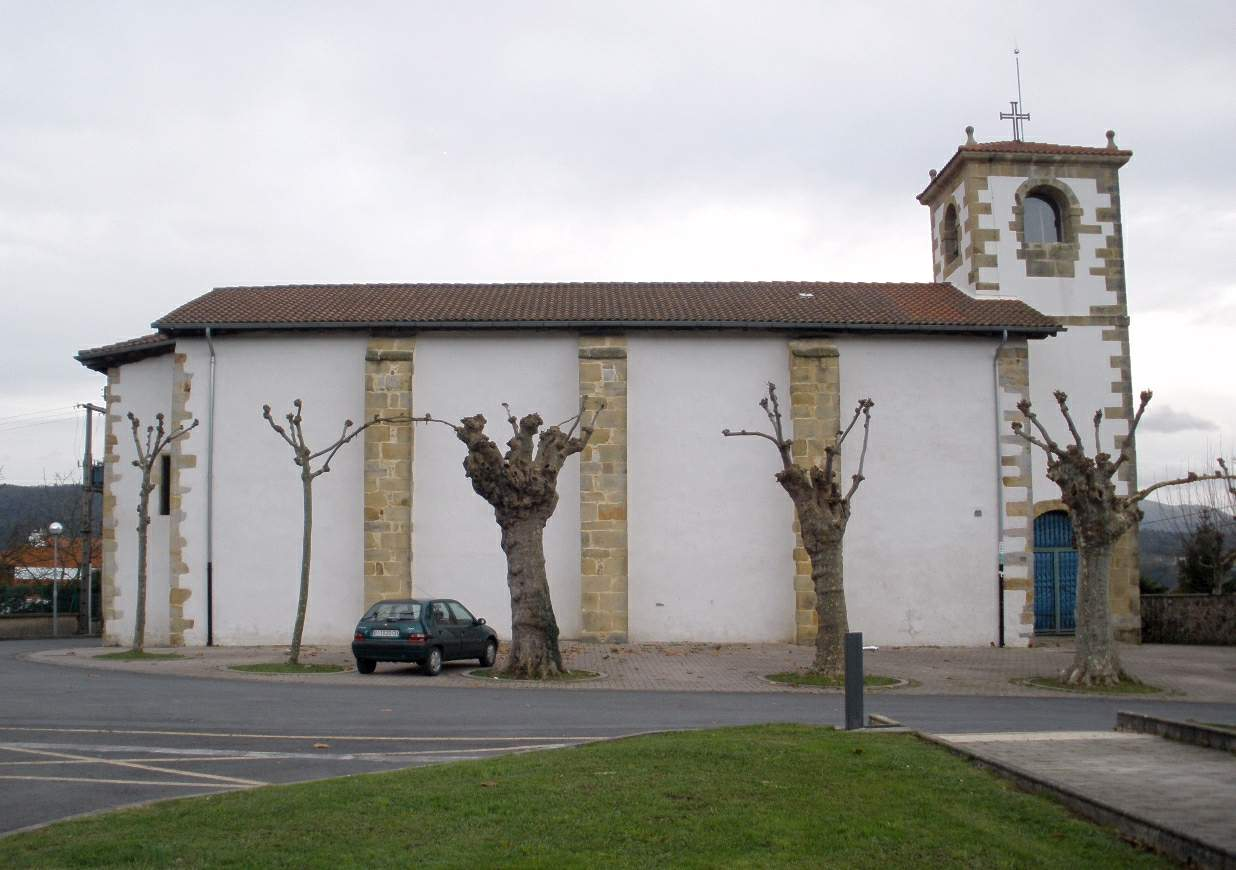 Iglesia de San Cristóbal, Derio (Bizkaia)